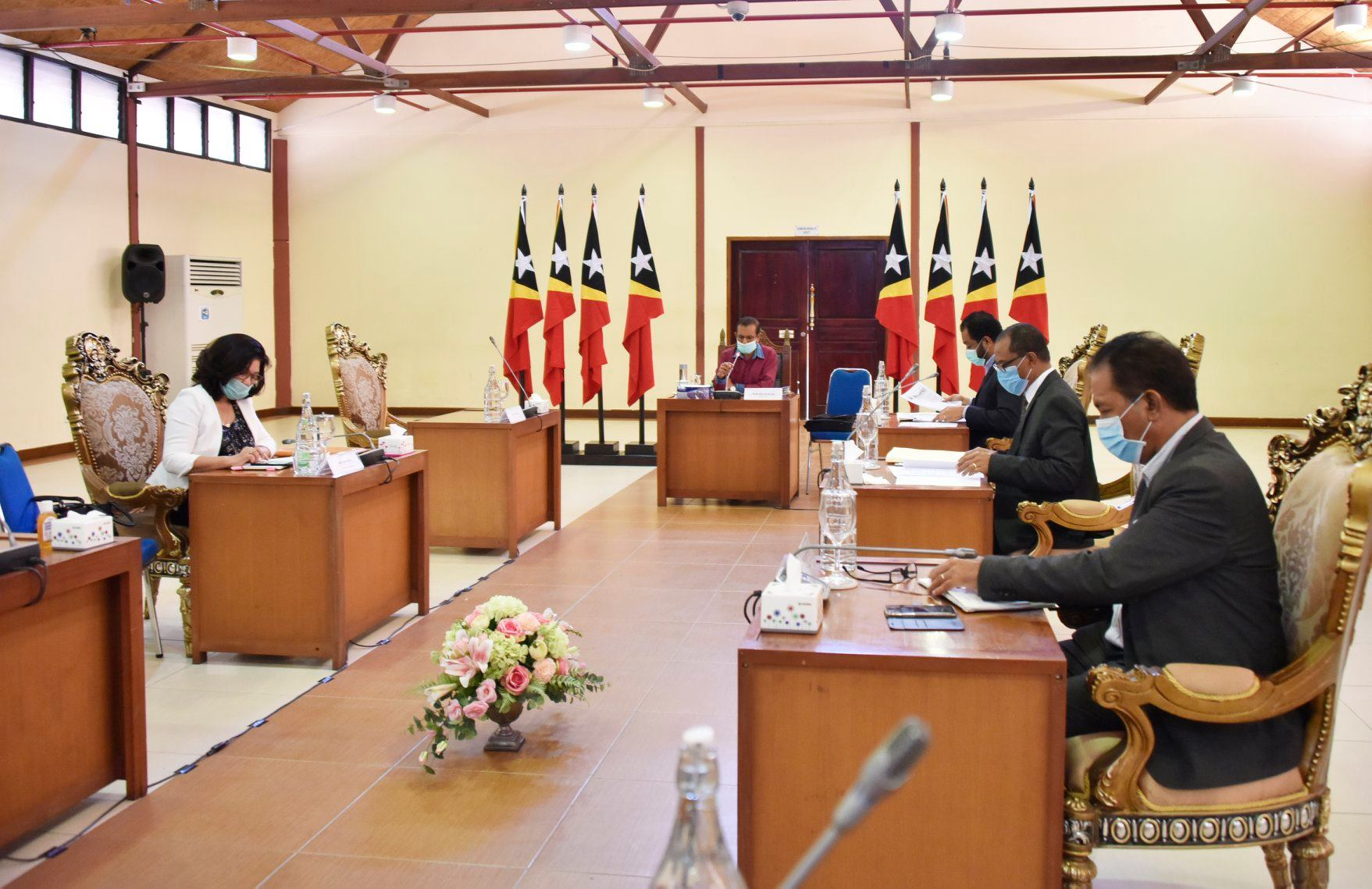 Sitzung des Regierungskabinetts unter Leitung von Premierminister Taur Matan Ruak in Zeiten der Corona-Pandemie. Um Abstand halten zu können, finden die Sitzungen im Centro de Convenções de Díli statt, dem alten Marktgebäude von Dili